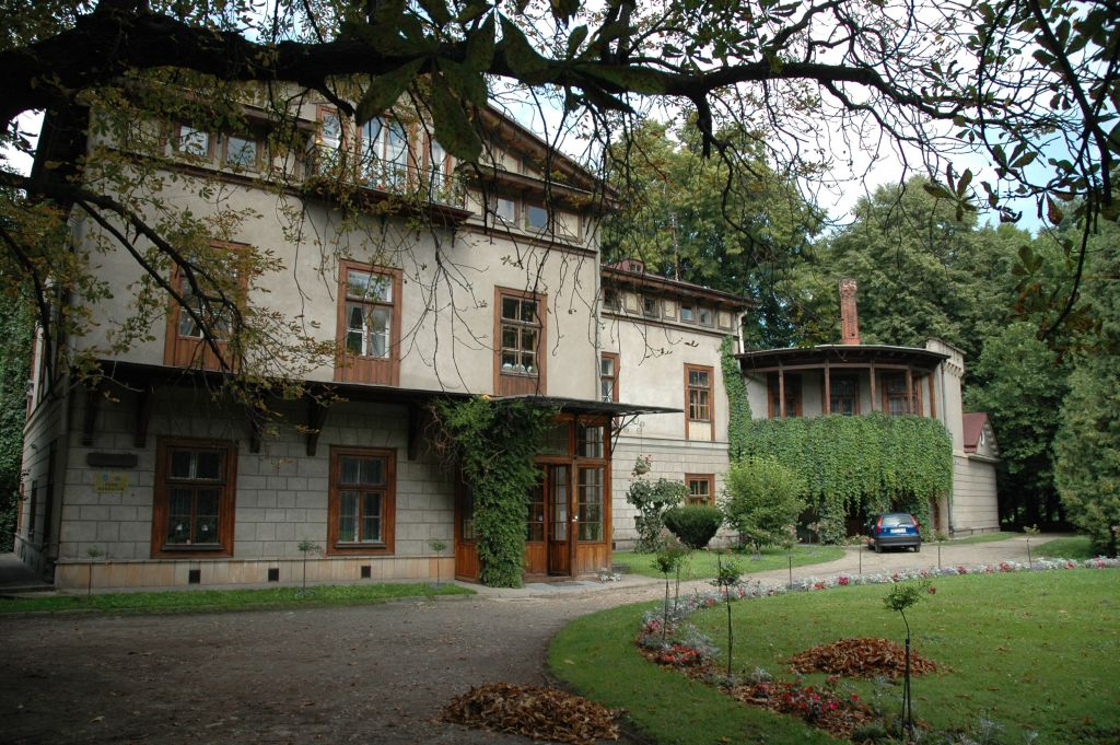 Poland, Przeworsk - palace.